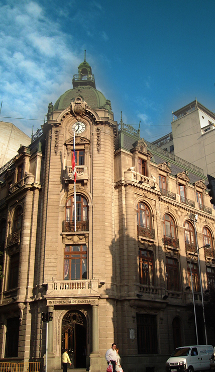 Edificio de la Intendencia Regional Metropolitana, en Santiago de Chile.